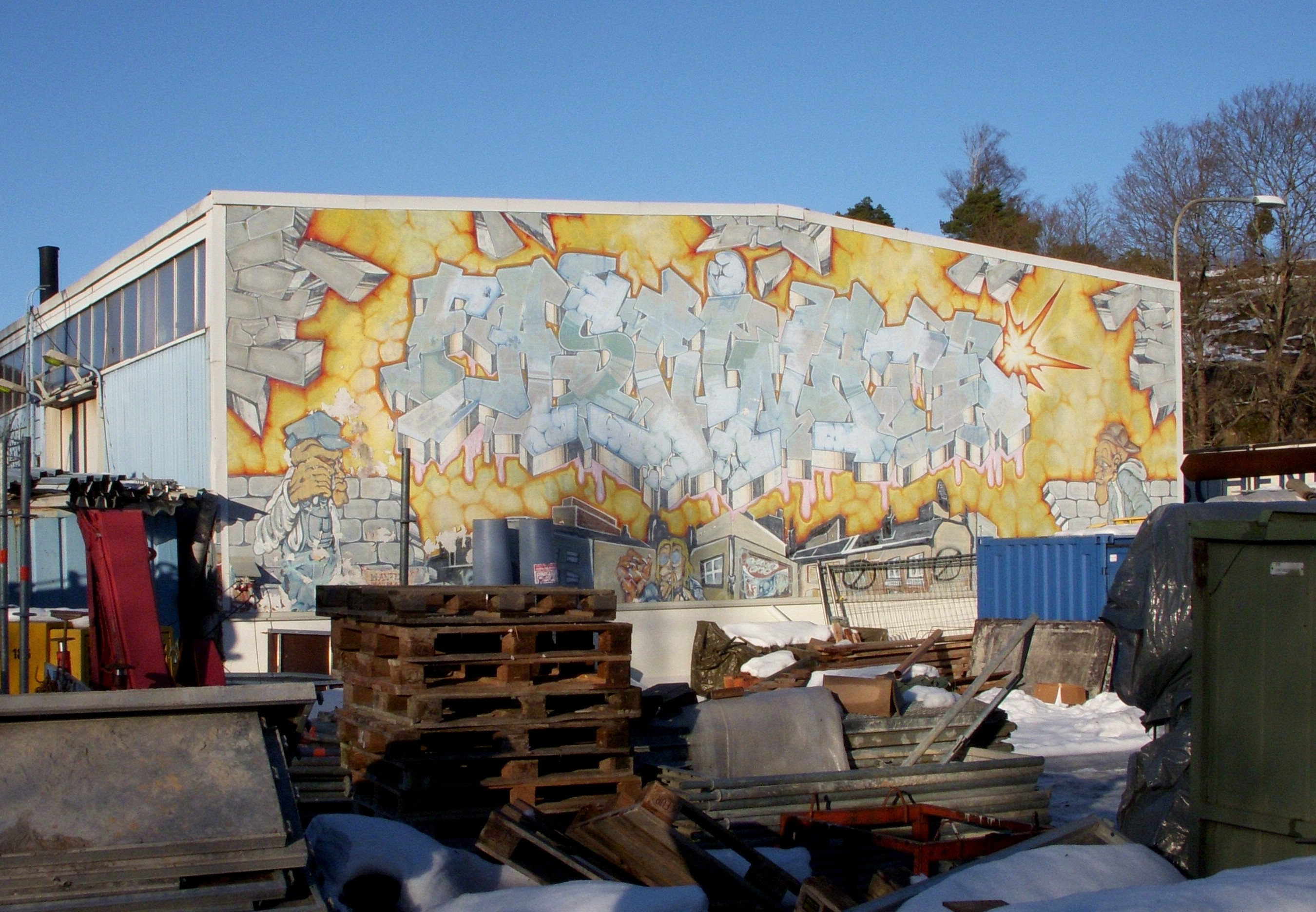 "Fascinate" i Bromstens industriområde, målad av Tarik och Circle 1989. Tarik Saleh är numera känd som dokumentärfilmare och regissör.